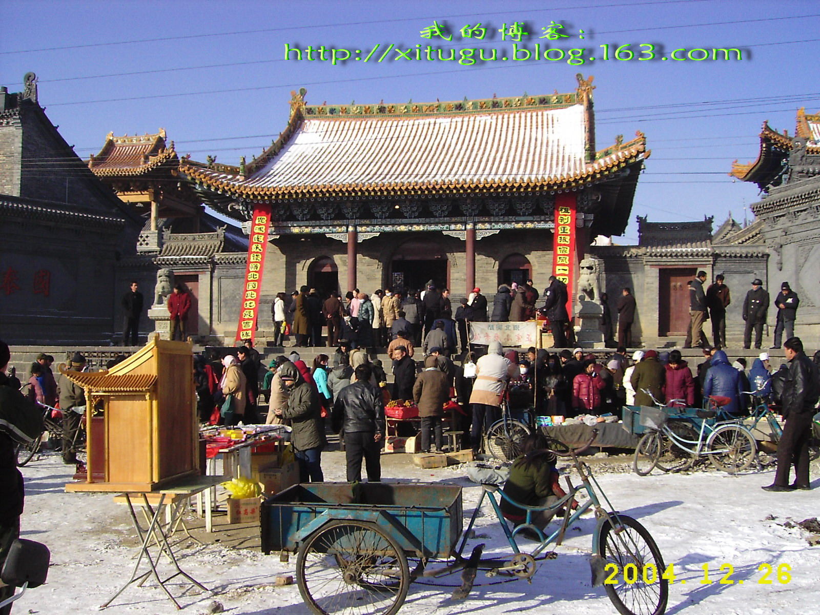 吕祖庙